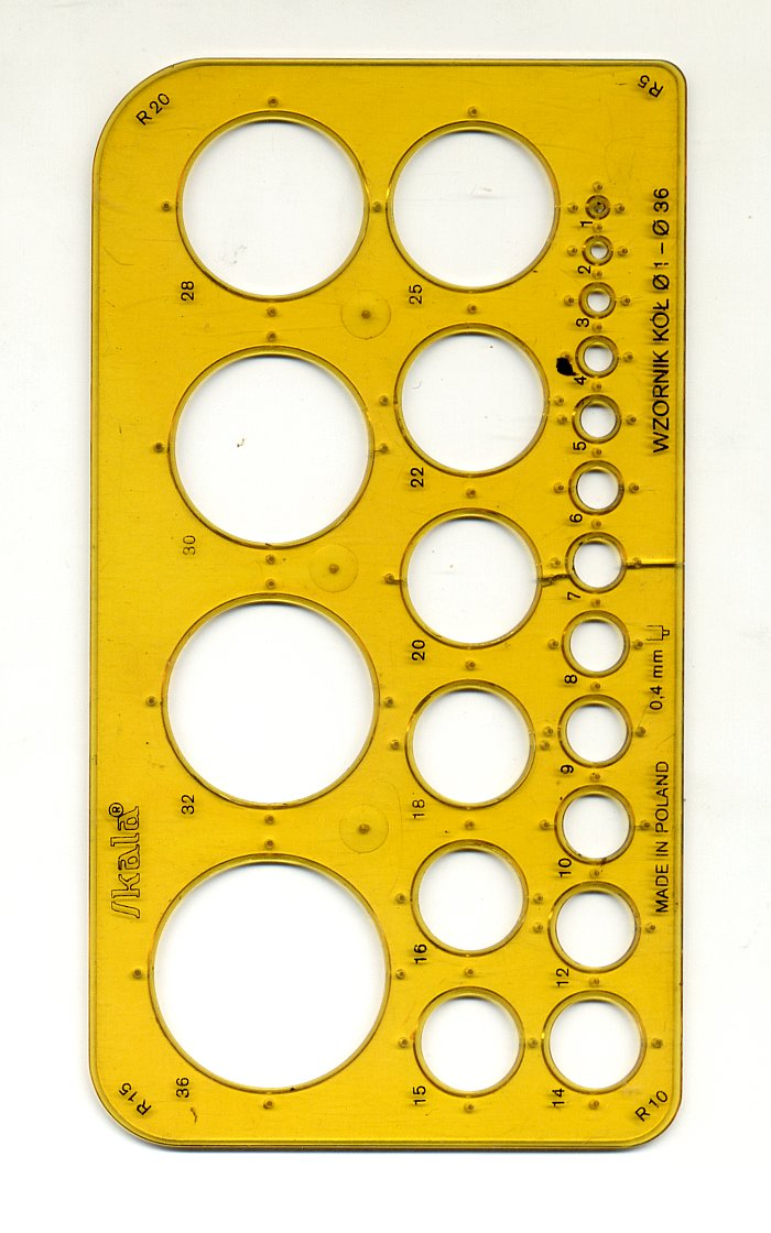 Wzornik, przyrząd kreślarski Own work